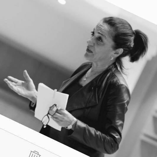 Nur Batur